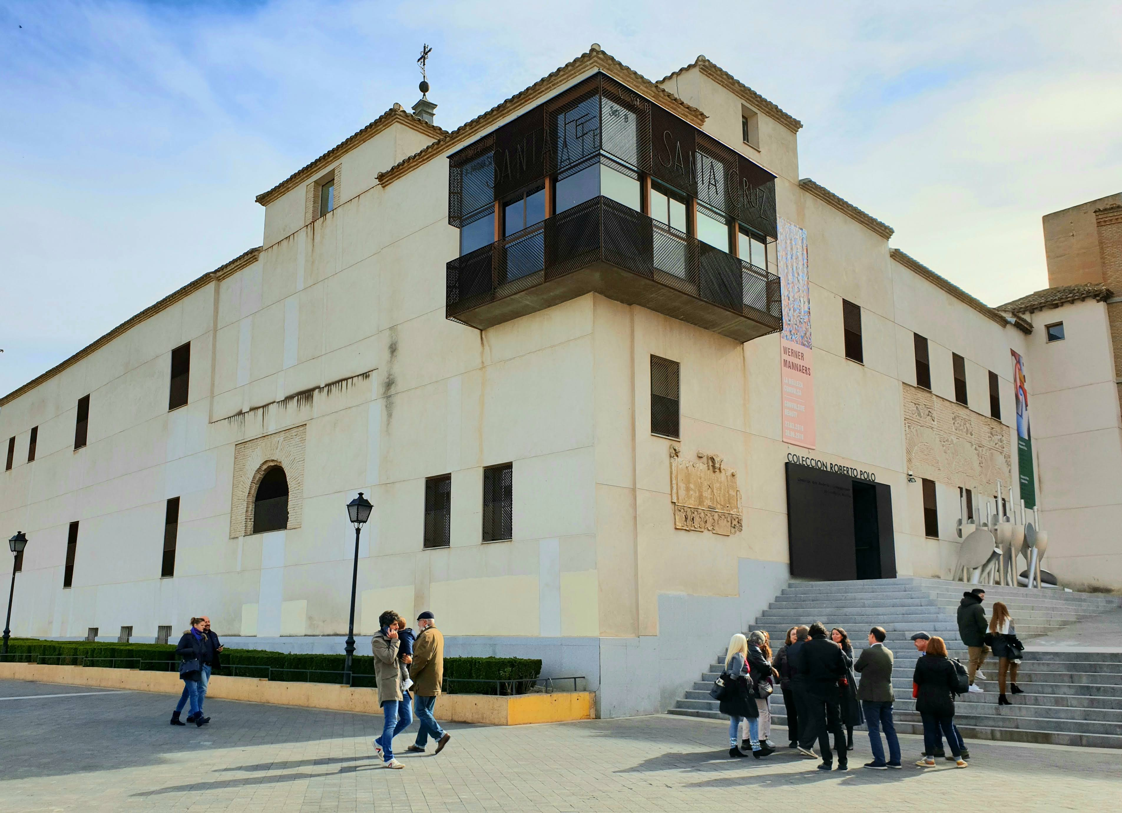 CORPO: Coleccion Roberto Polo, Toledo, Castilla La Mancha, Spania